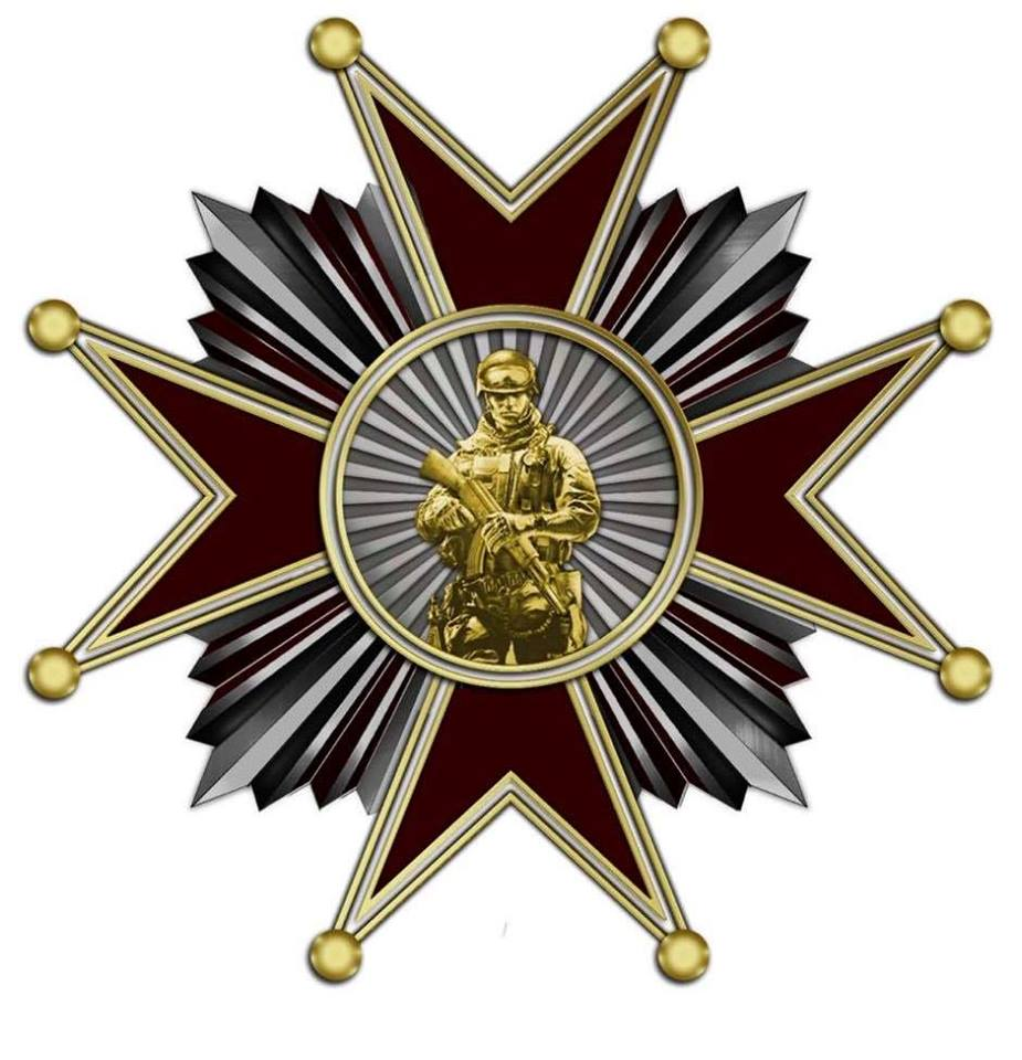 Відзнака Орден Добровольця, червоний чотирилистий хрест на сріблястій зірниці з солдатом-добровольцем в центрі.